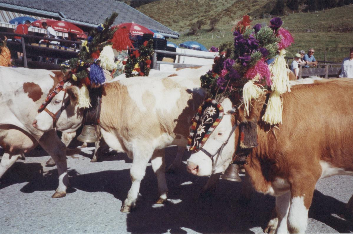 Almabtrieb